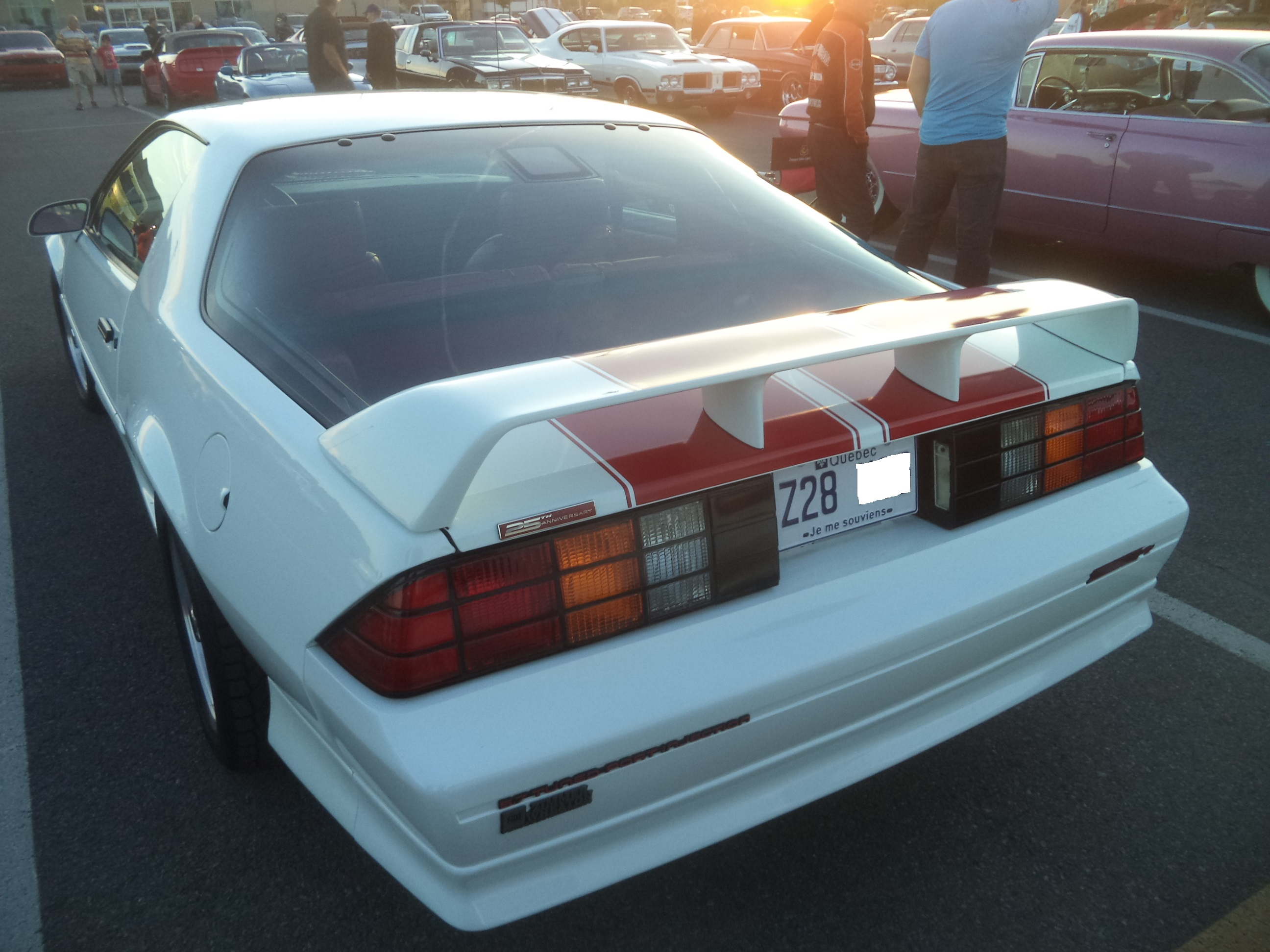 1992 Chevrolet Camaro Z28 25eme anniversaire arriere